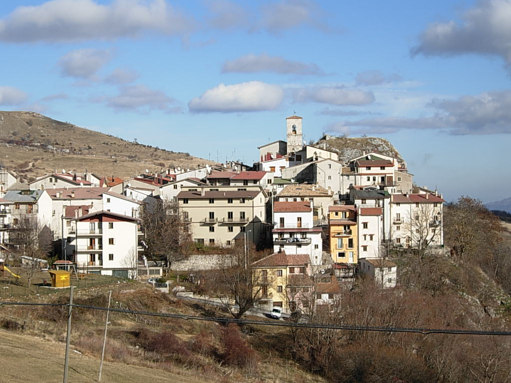 Il paese di Pietransieri, (AQ) Foto personale